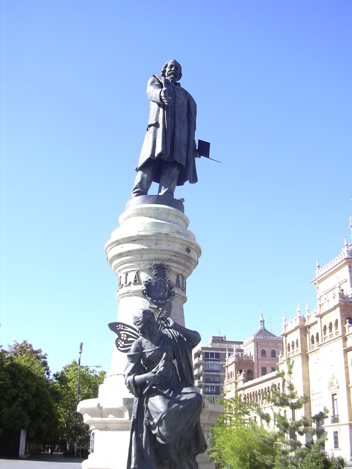 Poeta Zorrilla, Valladolid.